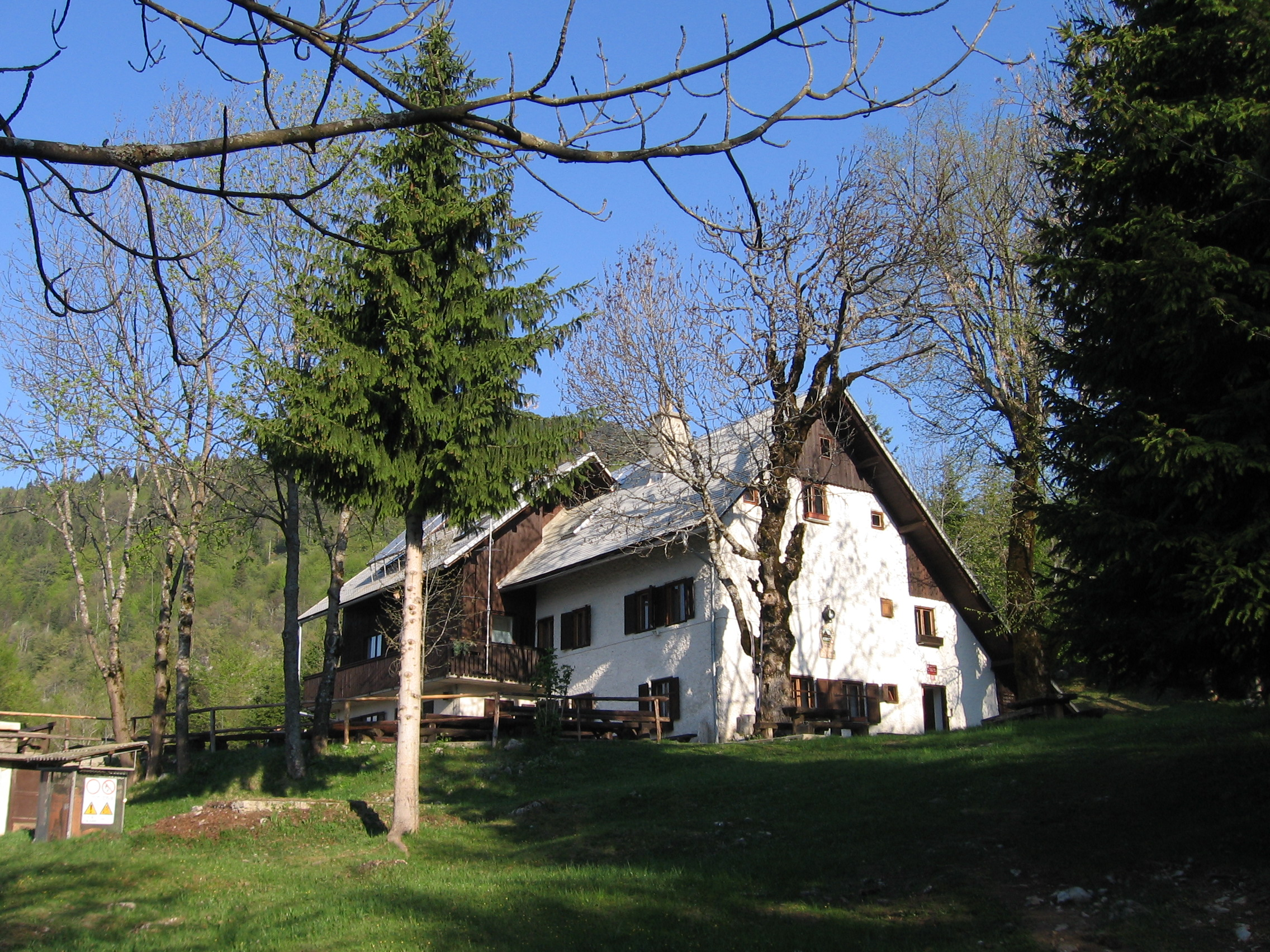 Hut of Drago Kosi on Vogar meadow above Bohinj lake, Slovenia